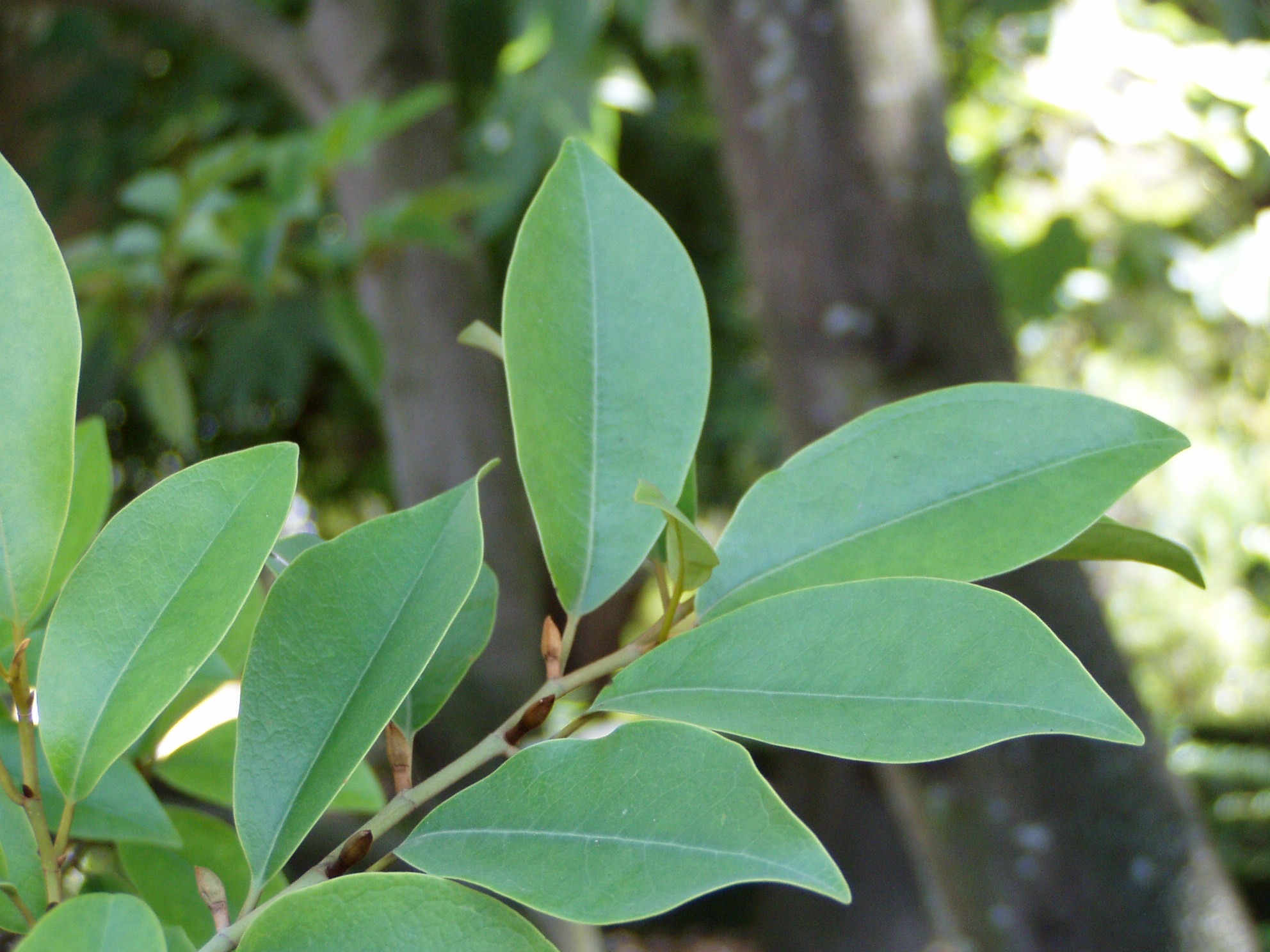 Magnolia compressa (syn. Michelia compressa; Formosan Michelia). Lisbon Botanic Garden, Portugal.